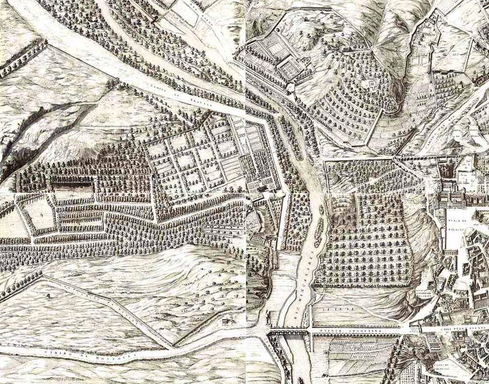 Plano de Texeira (1656). Fragmento con la Casa de Campo.